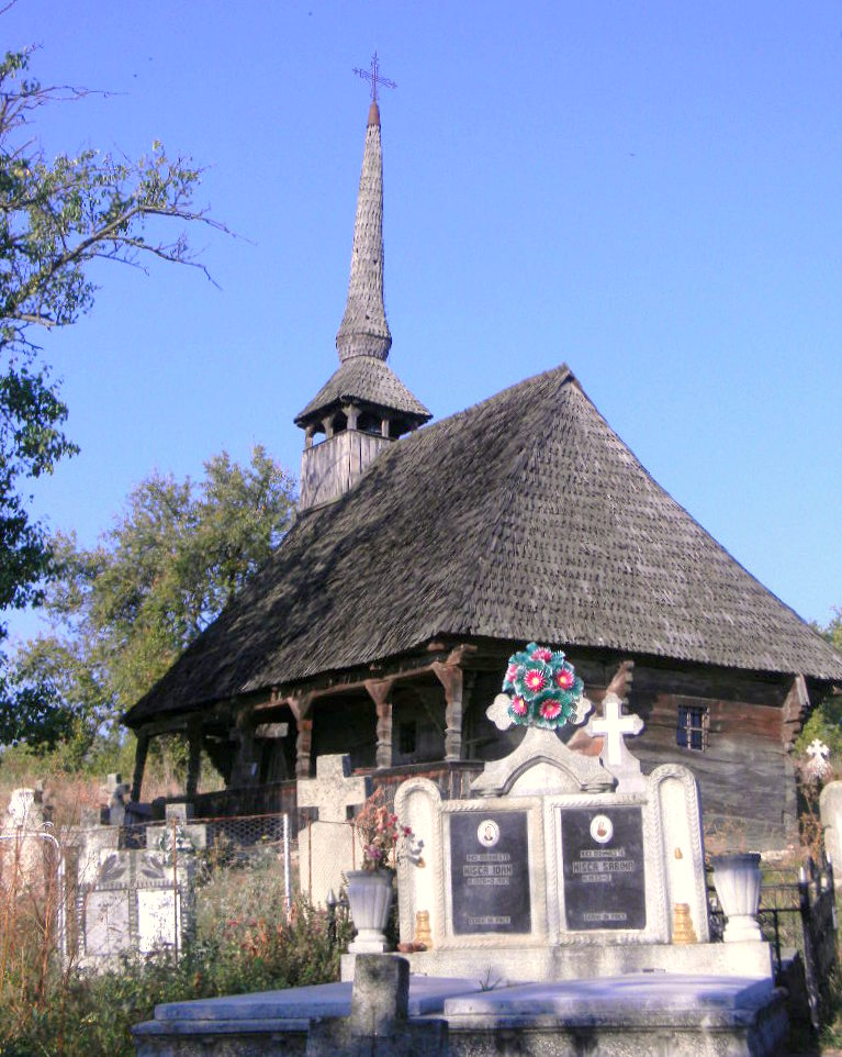 Biserica de lemn „Înălţarea Sfintei Cruci" din Pruneni